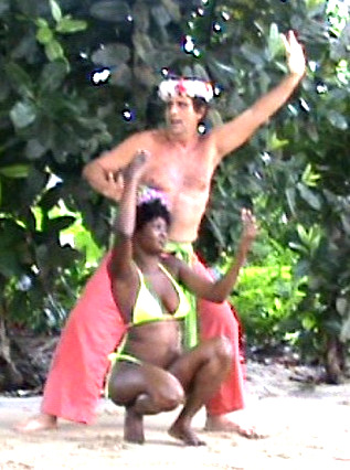 Kribi ballet : Nimozette et Dominique TRON en 2009